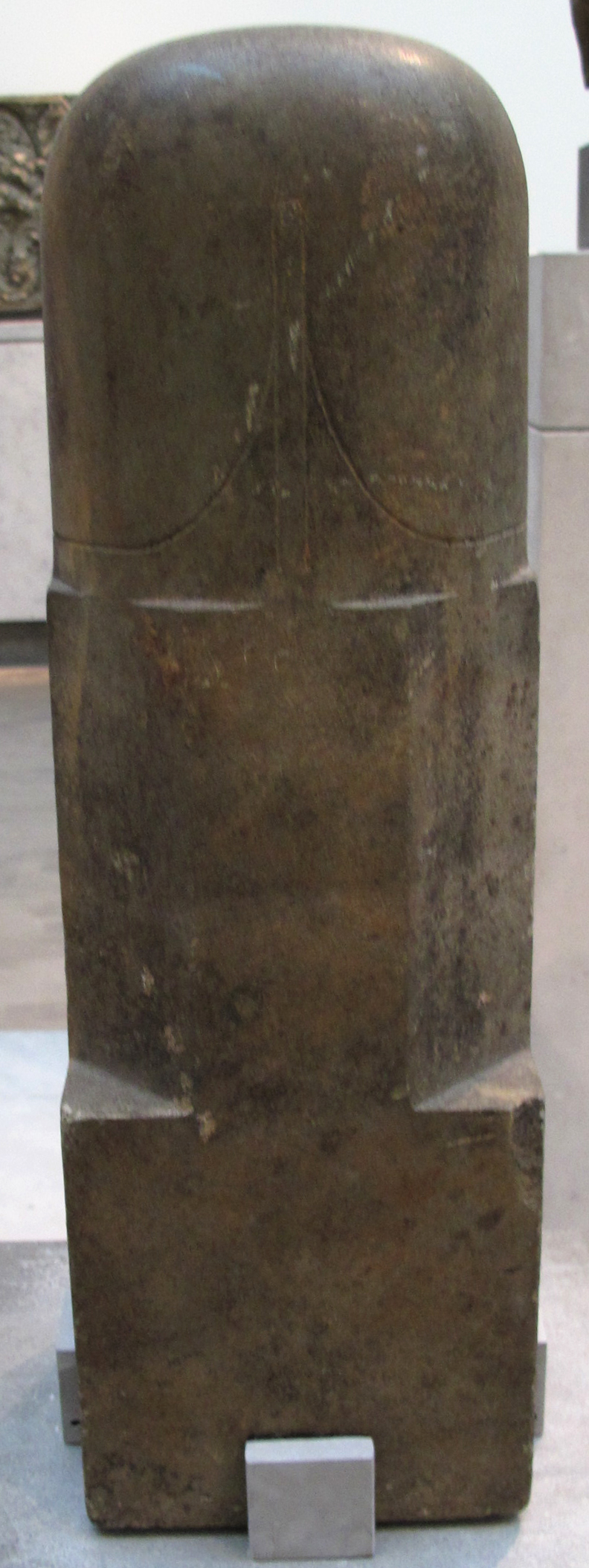 Cambogia, linga, X sec